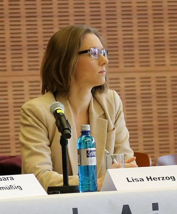 Beyond Aid - 2. Frankfurter Hilfe-Konferenz, 20.-22.2.2014, Abschlusspanel. Lisa Herzog